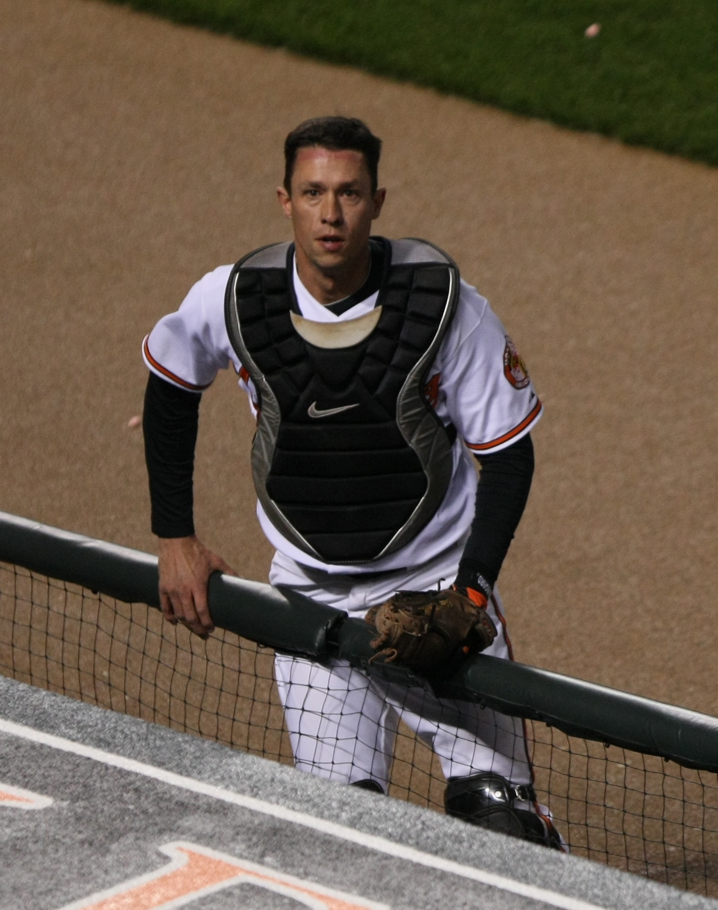 Chad Moeller